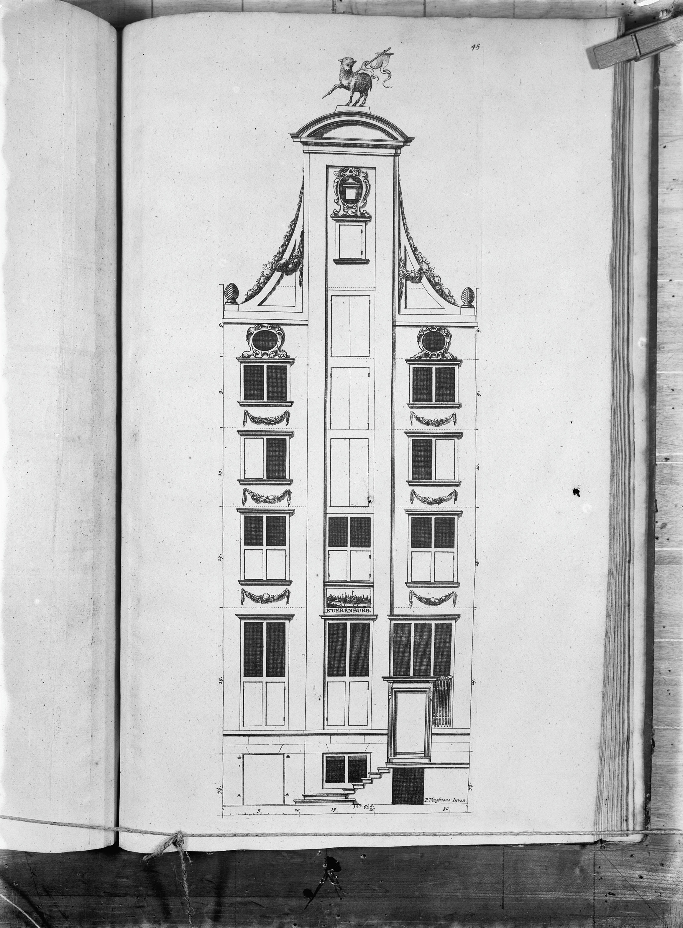 Klokgevel/ Tuitgevel: Ontwerp voorgevel van Vingboons (opmerking: Reproductie uit boek)